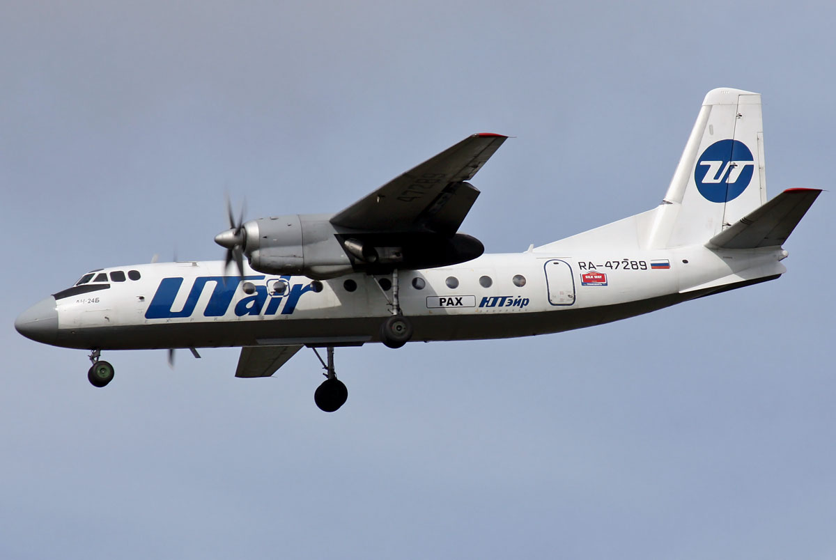 Antonov An-24